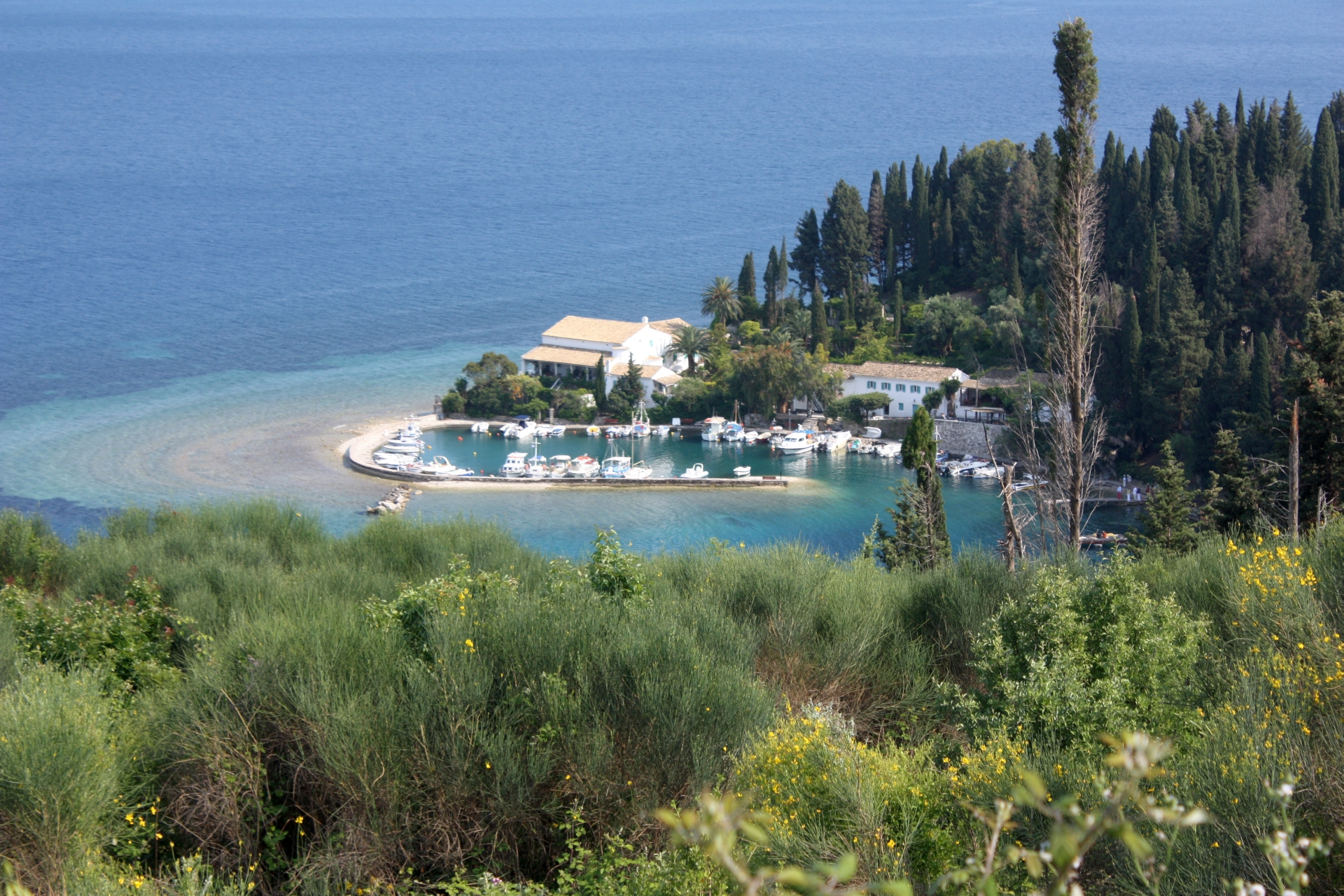 Kouloura Bucht